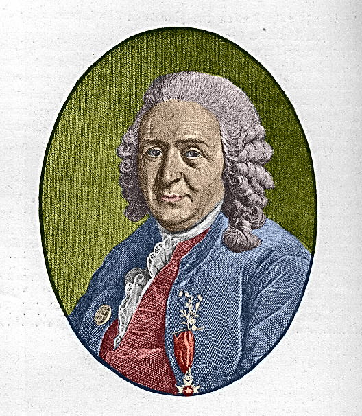 Carolus Linnaeus PD tekening van UT Library, ingekleurd naar bestaande tekening